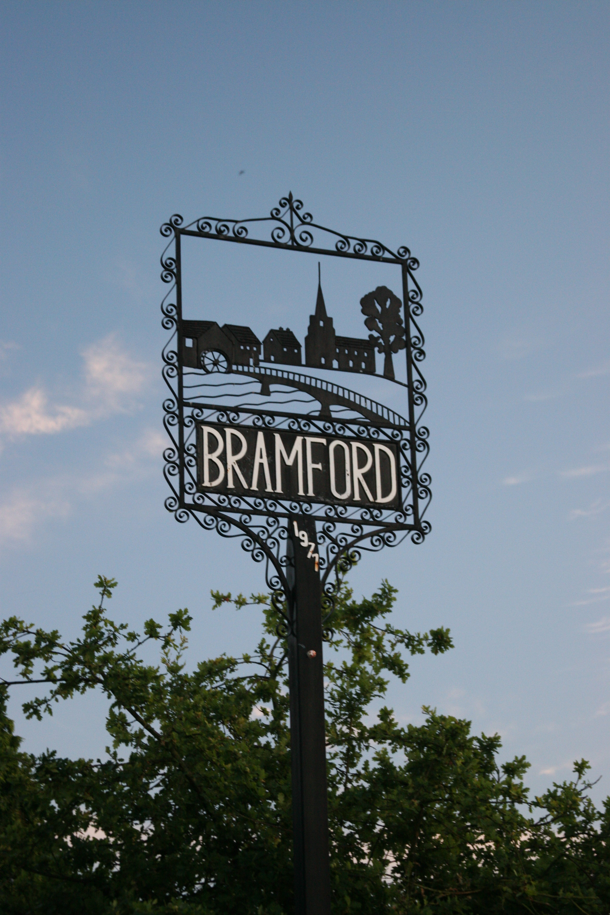 The village sign for Bramford in Suffolk